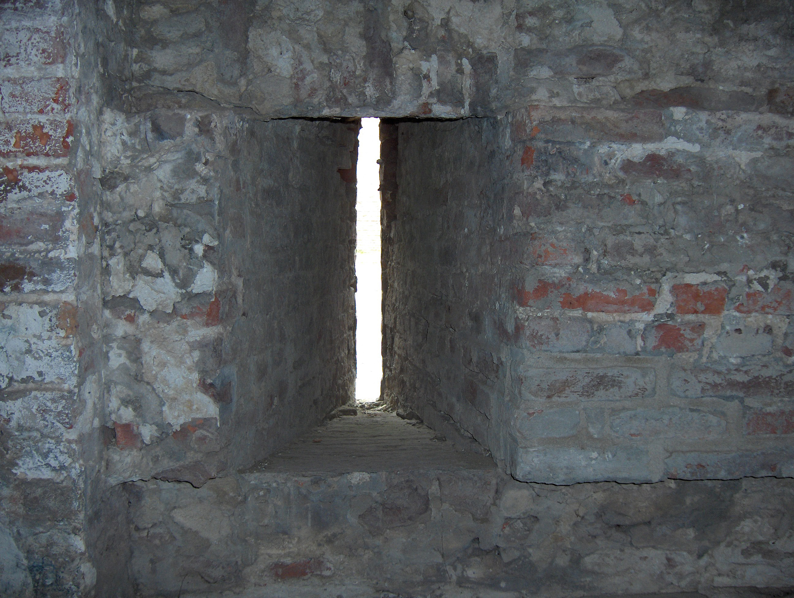 Rifle port inside a caponier, Fort Napoleon, Oostende, Belgium